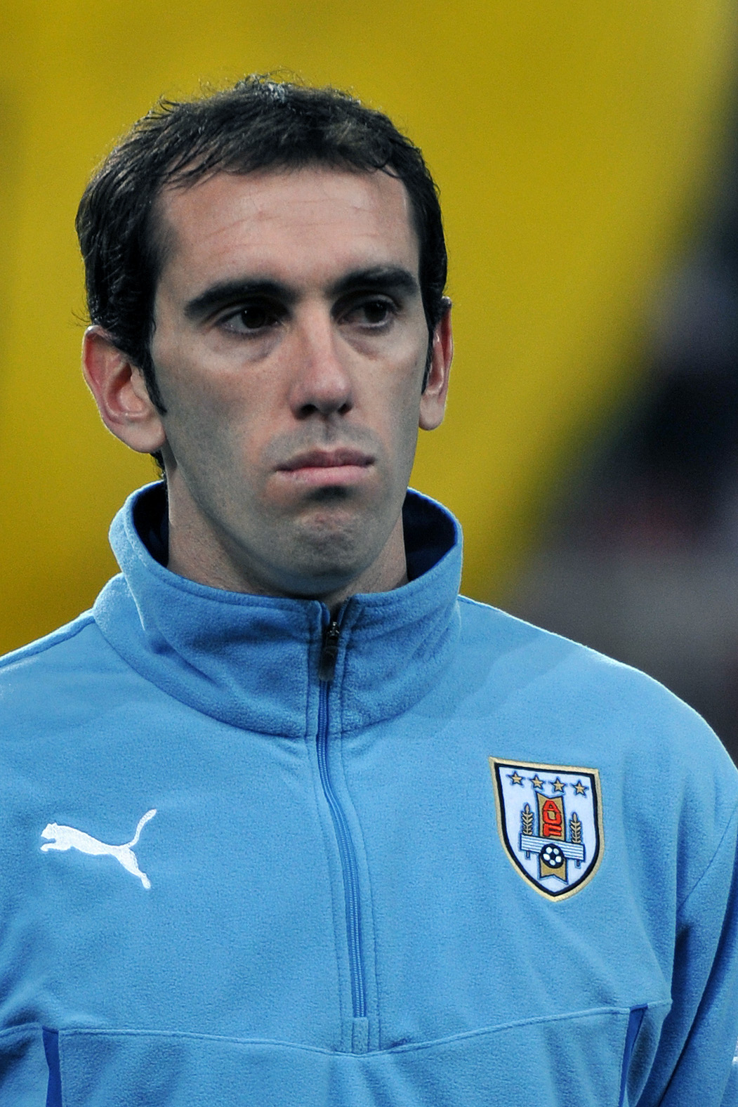 Foto de Diego Godín tomada el 5 de marzo de 2014, durante el partido internacional amistoso Austria - Uruguay jugado en Klagenfurt, en el estadio multiusos Wörthersee Stadion de dicha ciudad al sur de Austria, y como parte de la preparación de la selección de Uruguay para la Copa Mundial de Fútbol FIFA Brasil 2014.